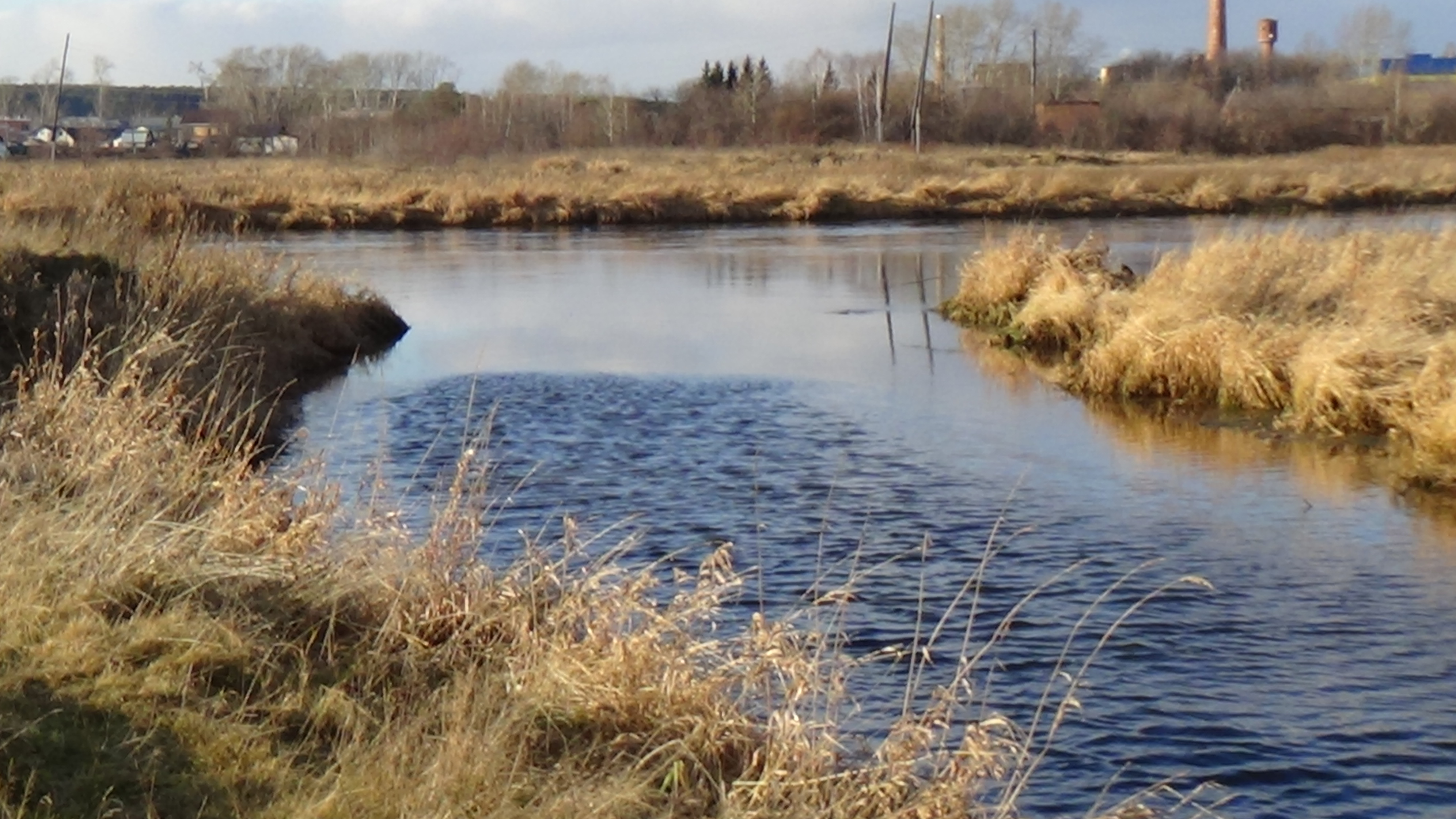 Река Бобровка впадающая в реку Исеть в посёлке Бобровский.